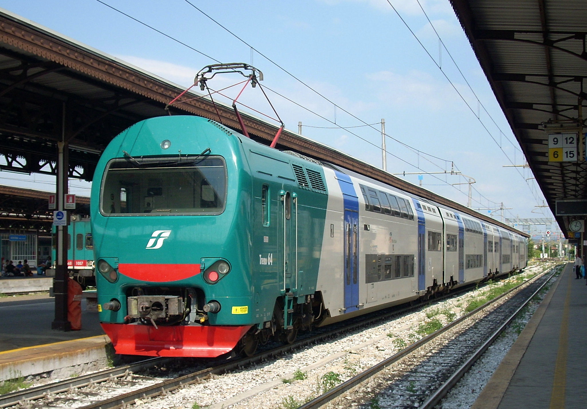 Treno ad Alta Frequentazione delle Ferrovie dello Stato, in sosta a Verona Porta Nuova. In testa la ALe 426.063, all'altra estremità la ALe 506.064 (treno 64)